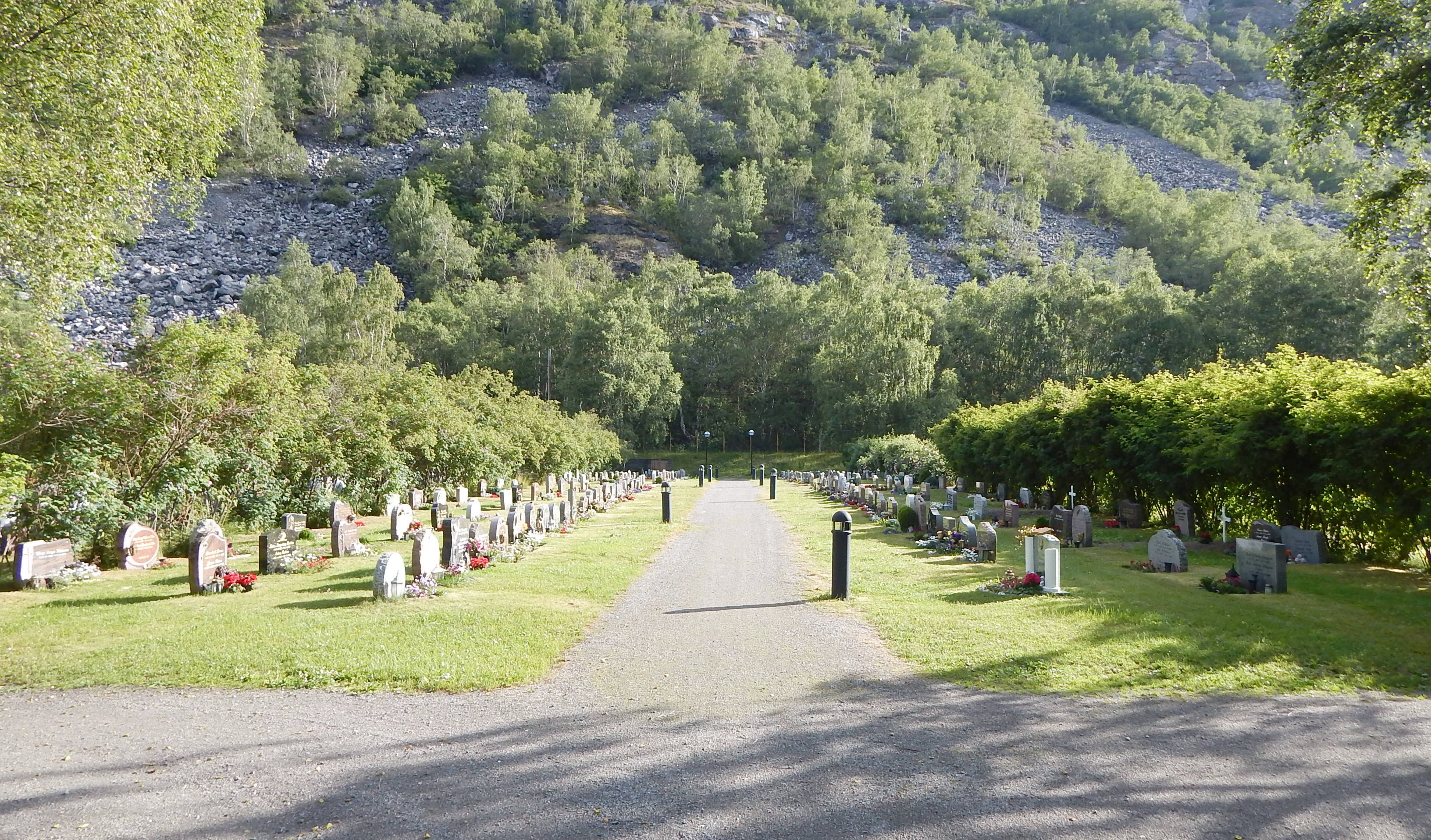 Farnes nye kirkegård, Øvre Årdal